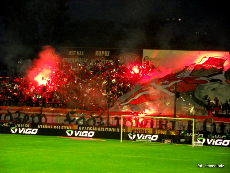 Płonęły race na Widzewie